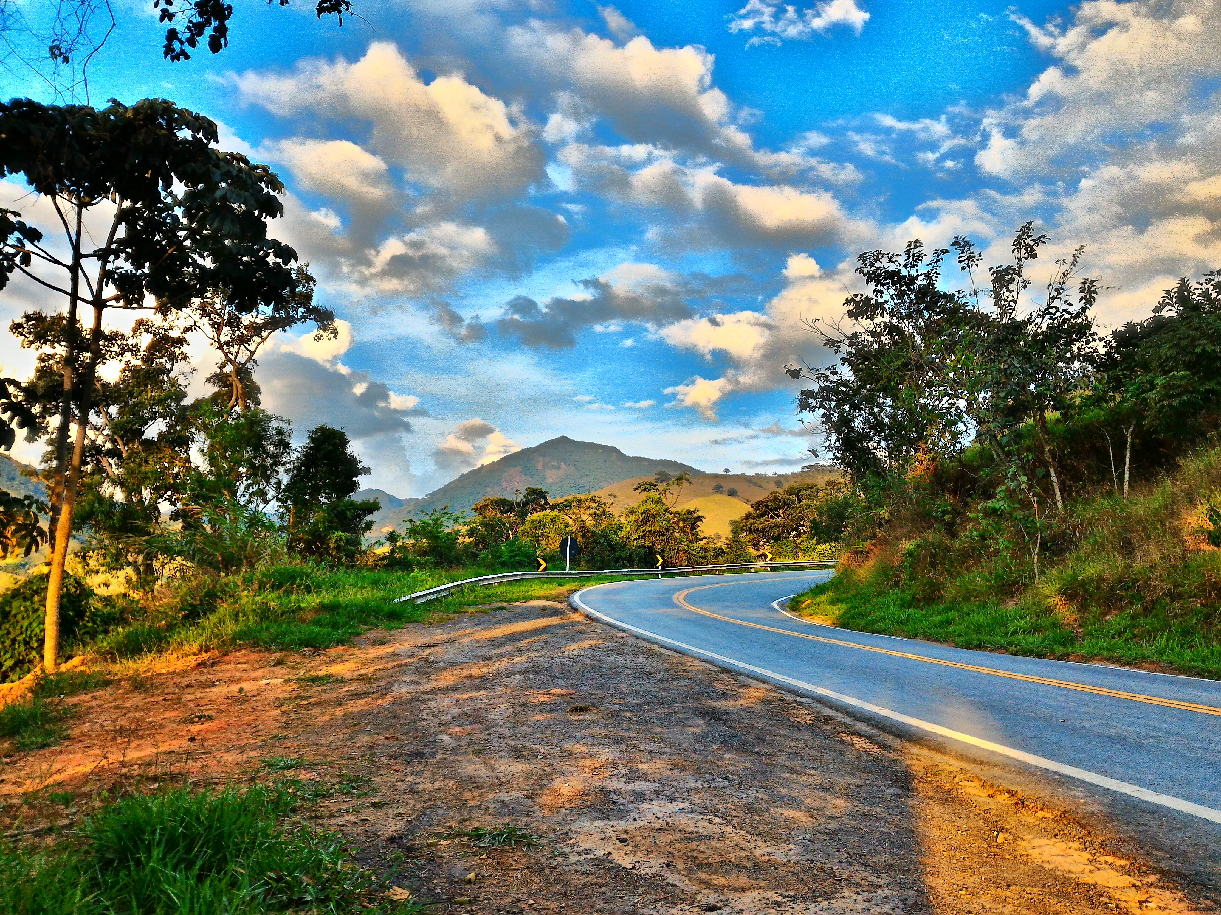 Por do Sol na BR 354 em Itamonte, com vista para o parque nacional de Itatiaia